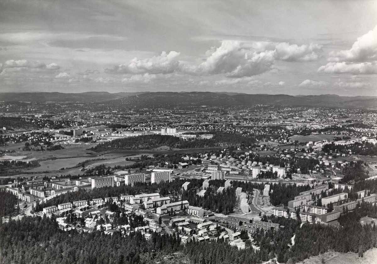 Flyfoto av Bøler i Oslo, ca 1980-1985.